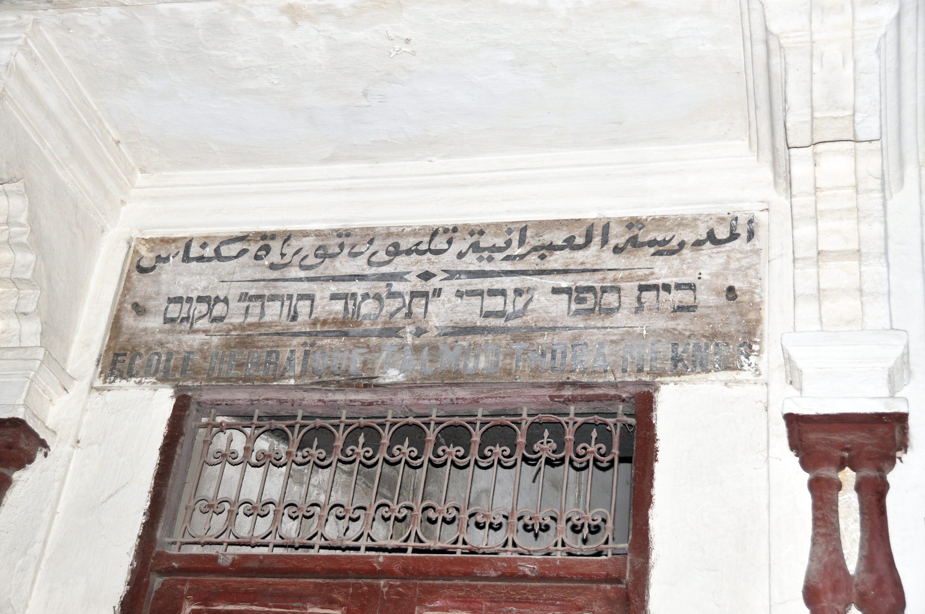 שער התלמוד תורה במקנס